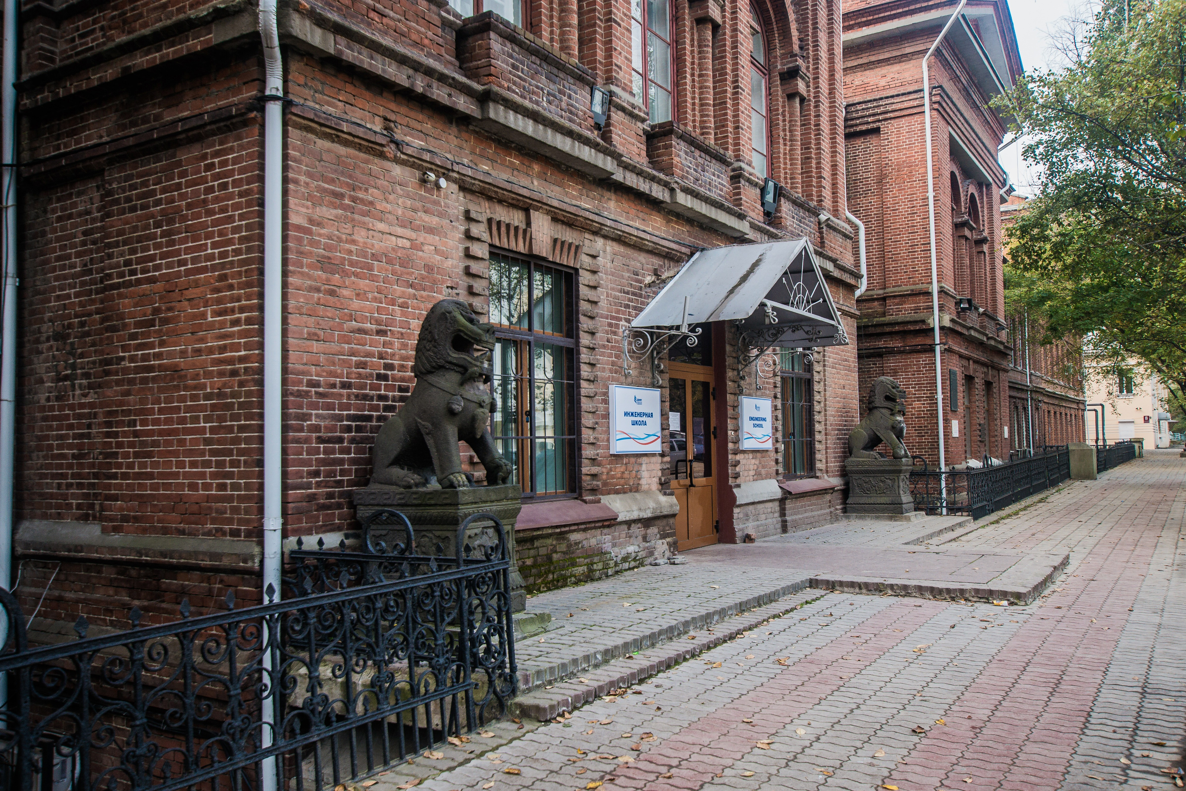 Здание Восточного института (Приморский край, Владивосток, Пушкинская улица, 10)